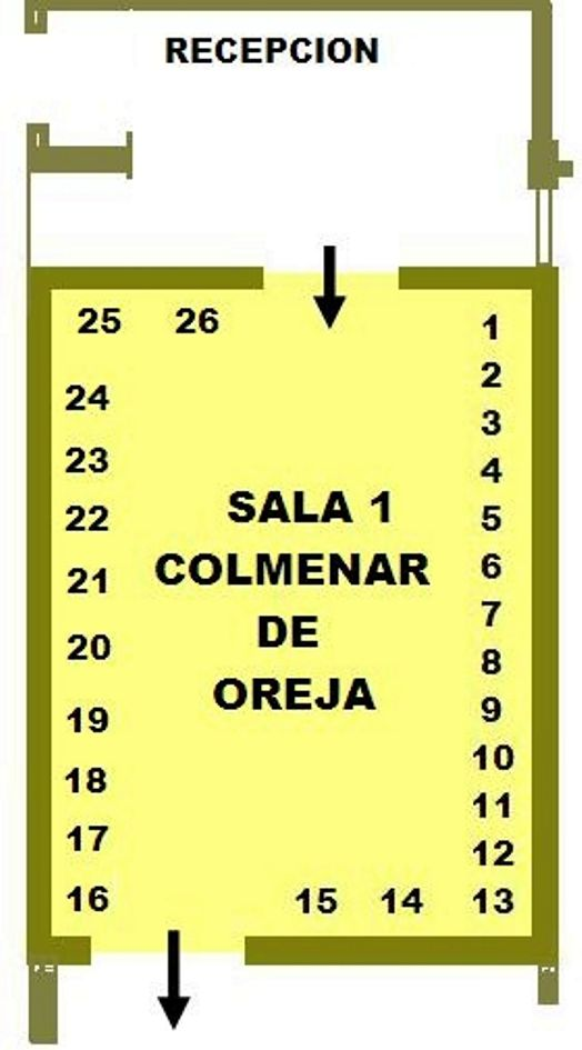 Plano de la situacoón de los cuadros de la sala nº 1 dedicada a Colmenar de Oreja. La distribución de los cuadros corresponde a 2011